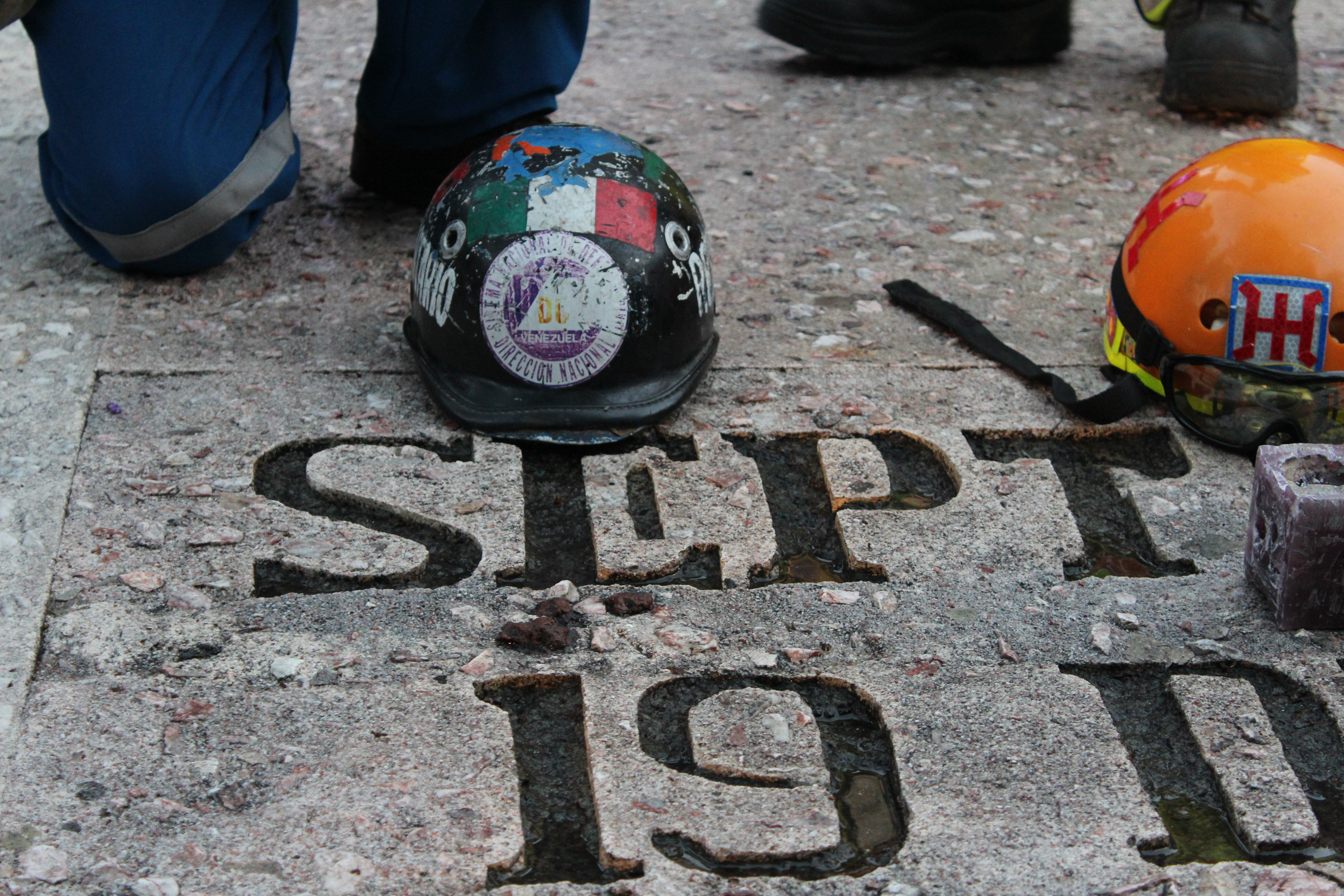 Casco de rescatista. Ceremonia luctuosa por 30 años del Terremoto de México de 1985 - Plaza de la Solidaridad, Ciudad de México, México.